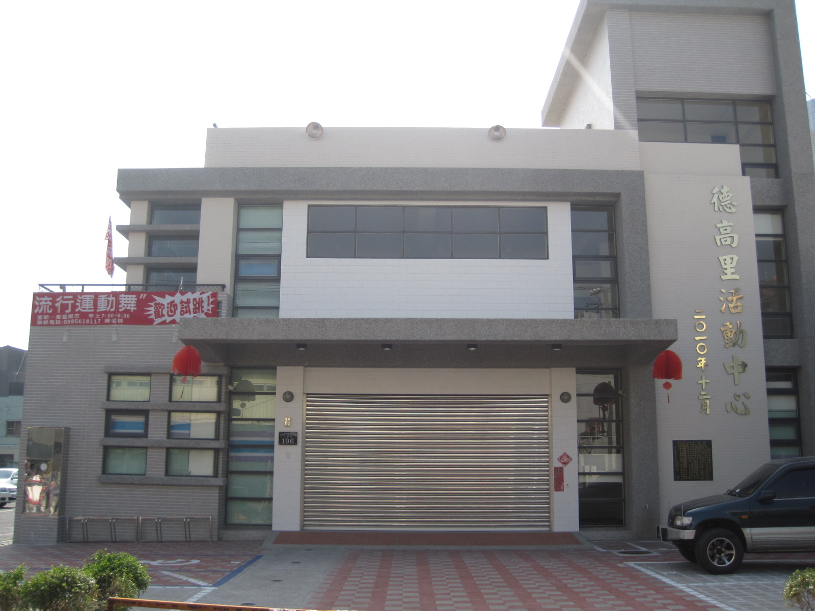 臺南市東區德高里活動中心